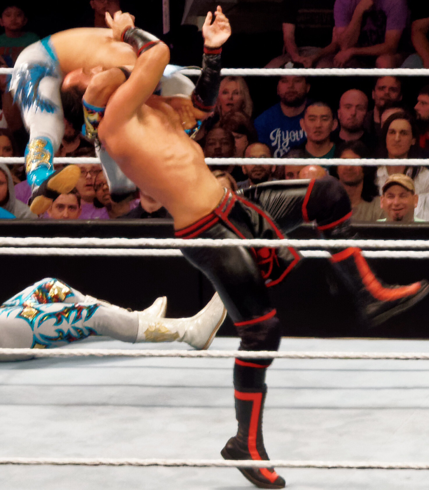 2015-03-30_17-54-37_ILCE-6000_1444_DxO